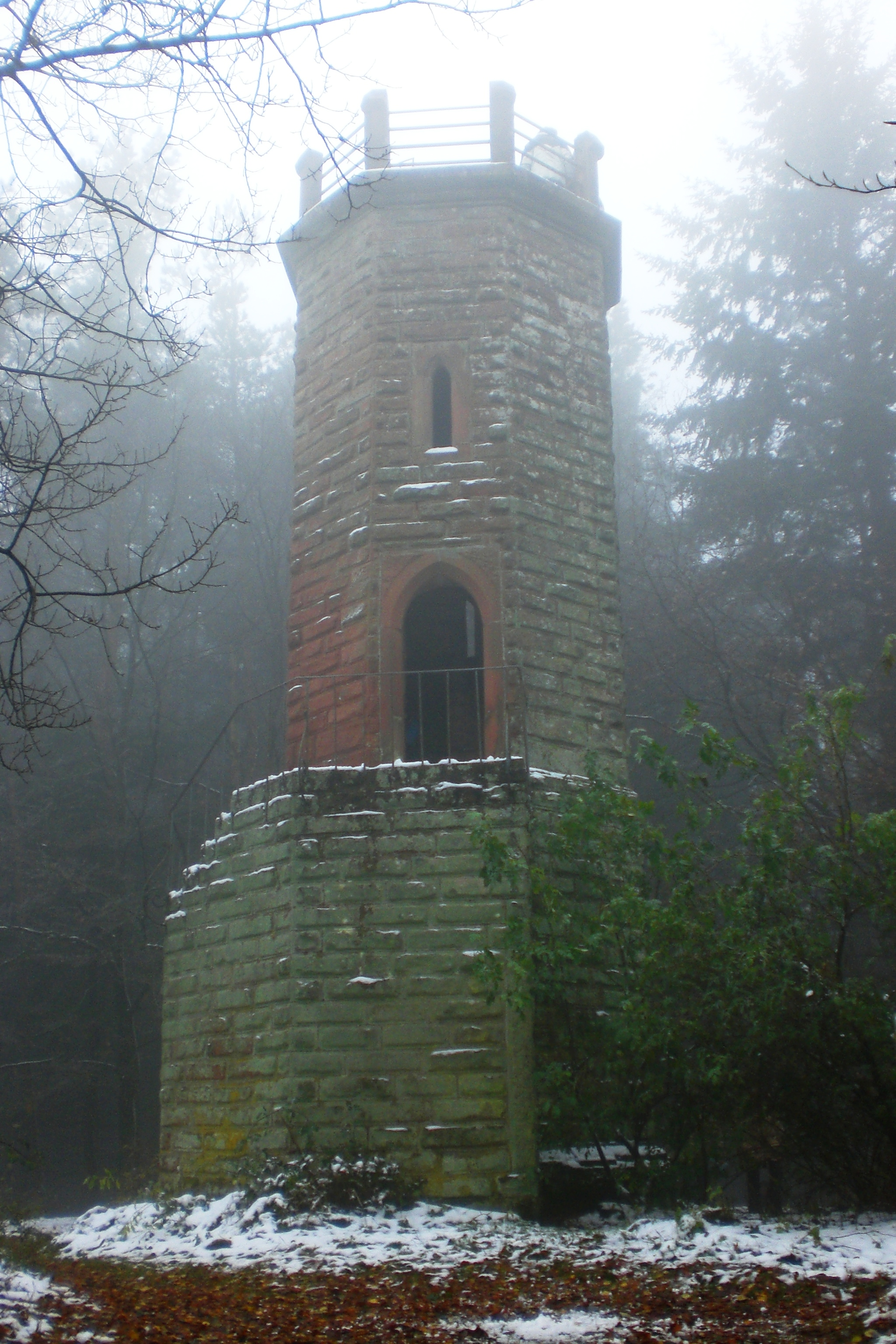 Schänzelturm